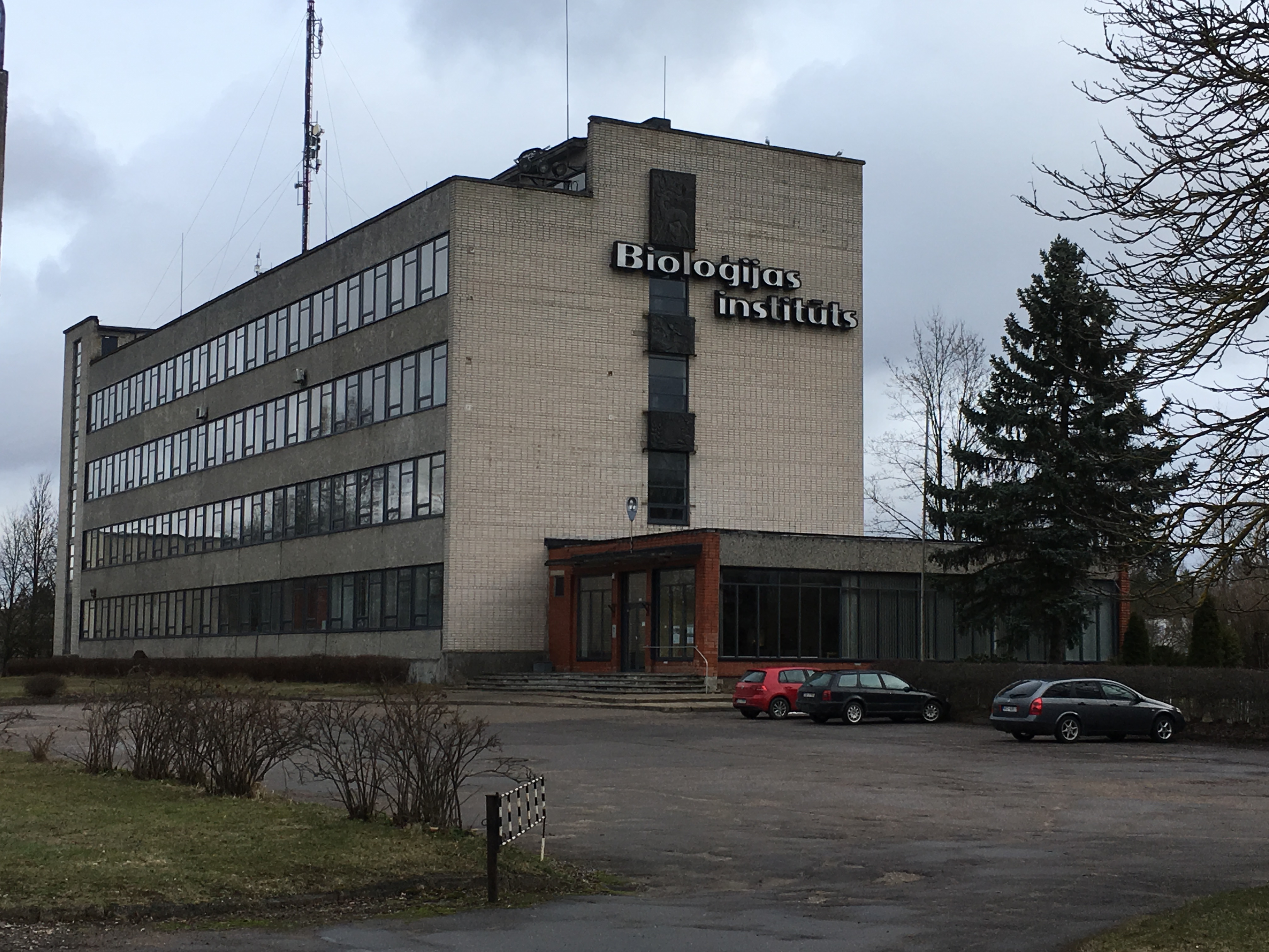 ZA Bioloģijas institūta ēka Salaspilī, Miera ielā 3